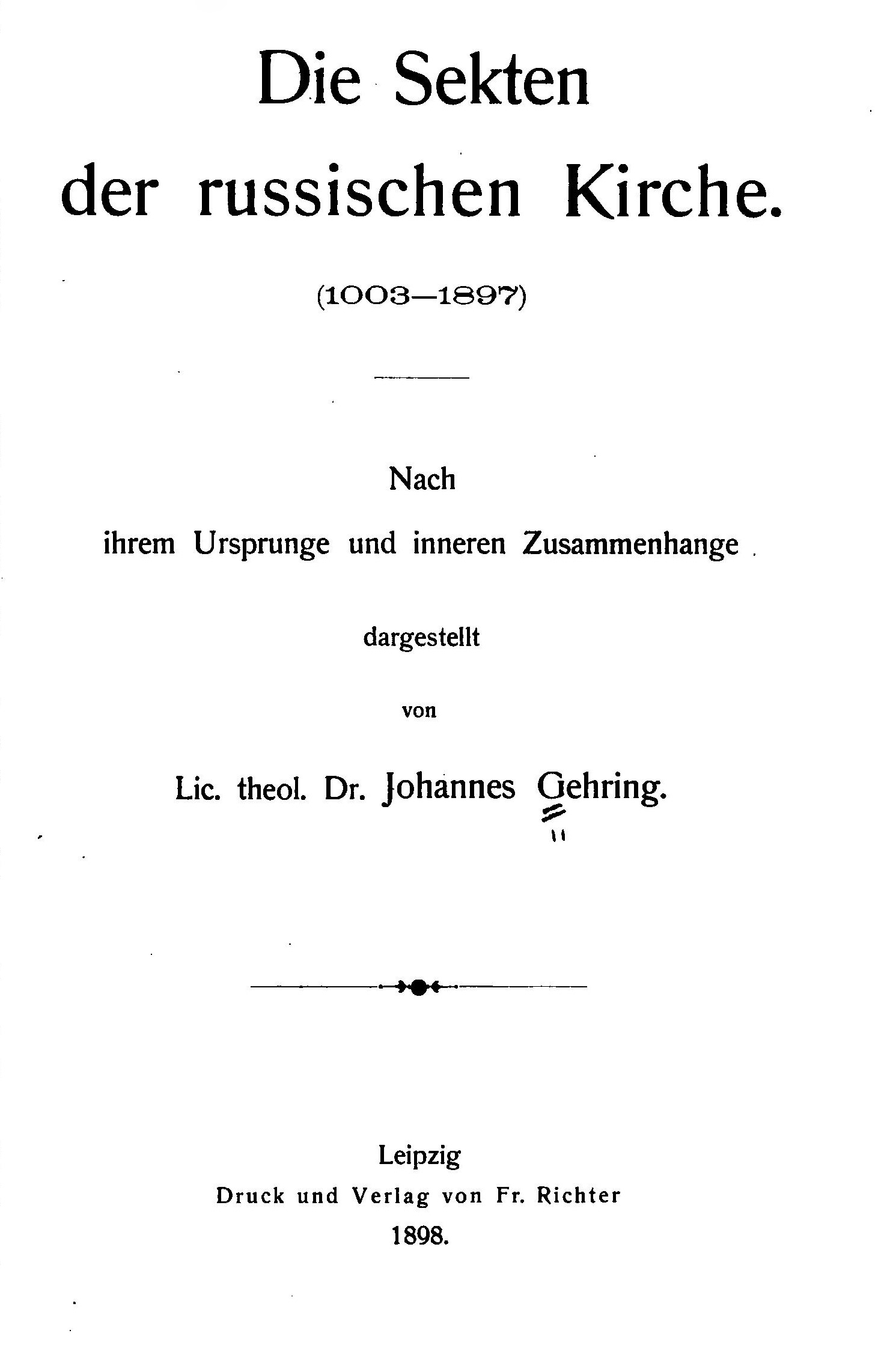 Veröffentlichung von J. Gehring